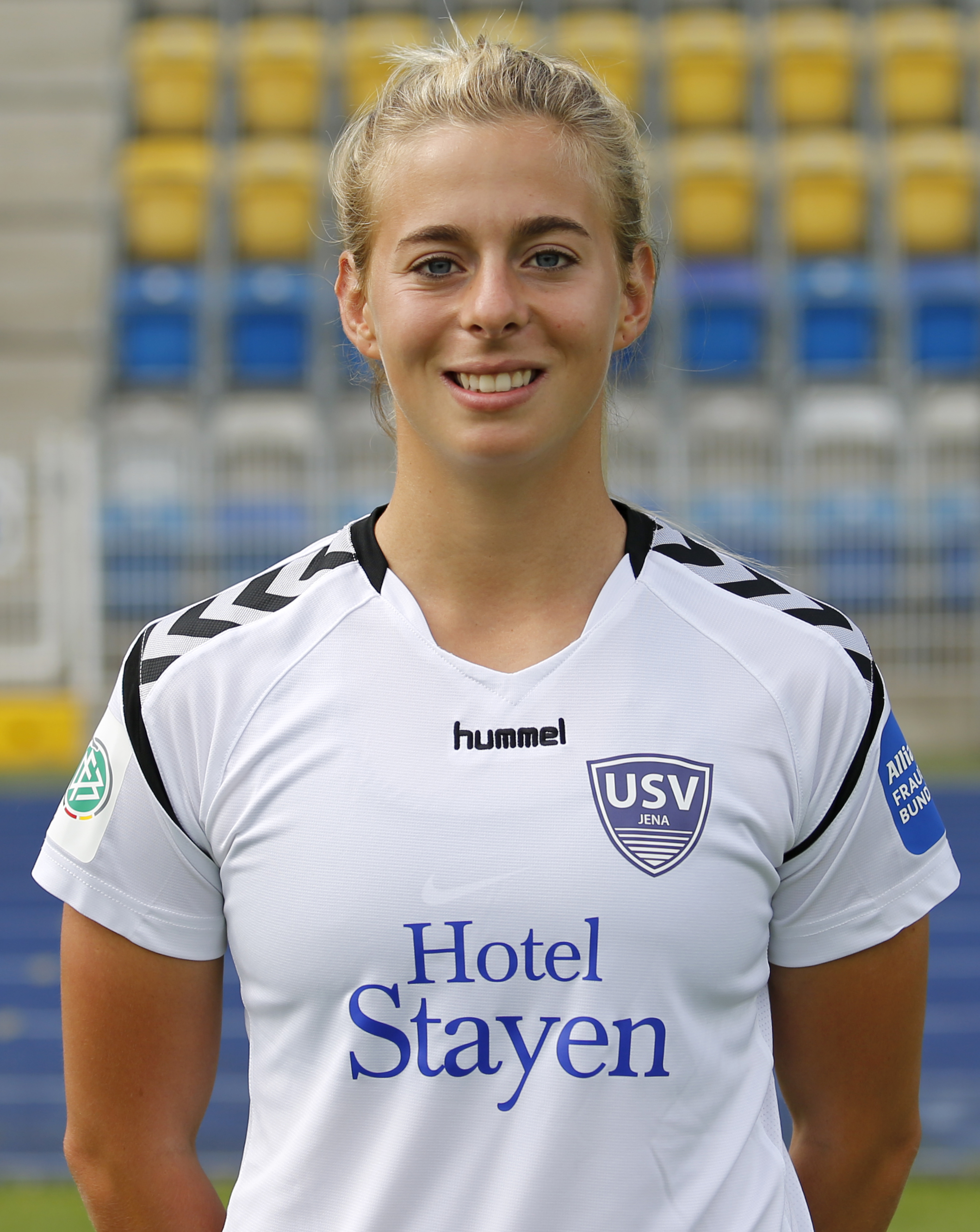 Amelia Pietrangelo